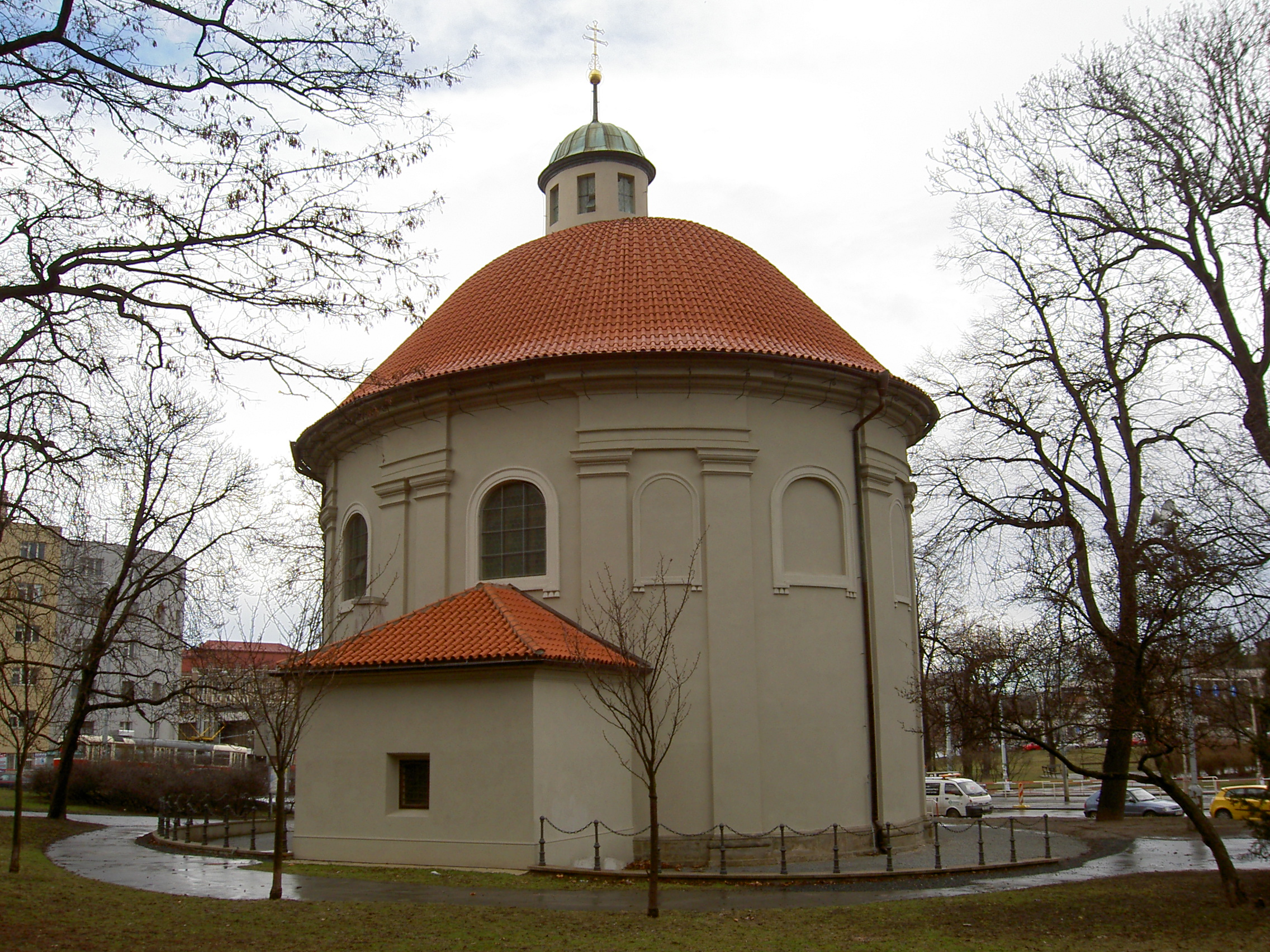 Kostel svatého Rocha na Žižkově